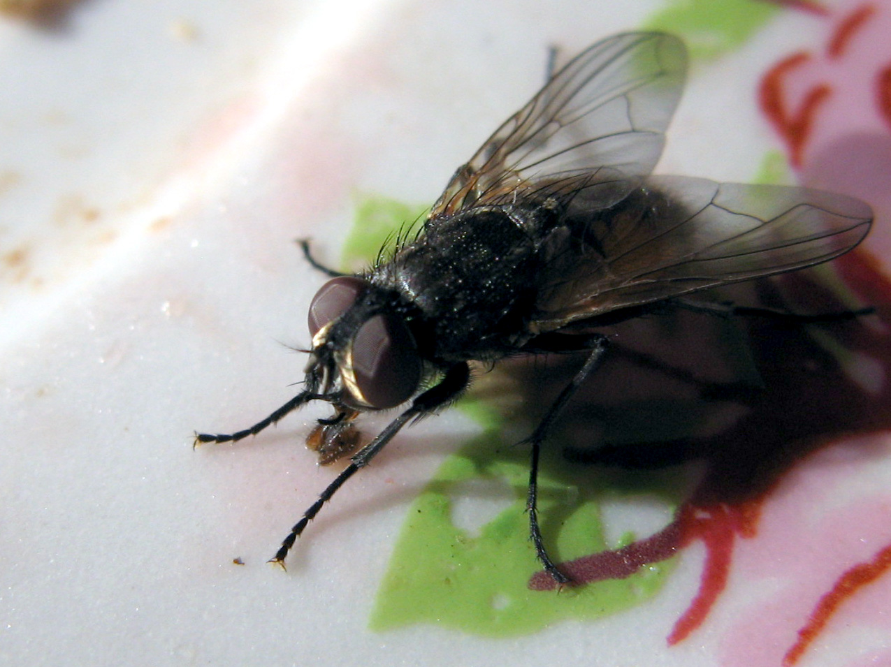 Муха домашняя; Fly, Musca domestica